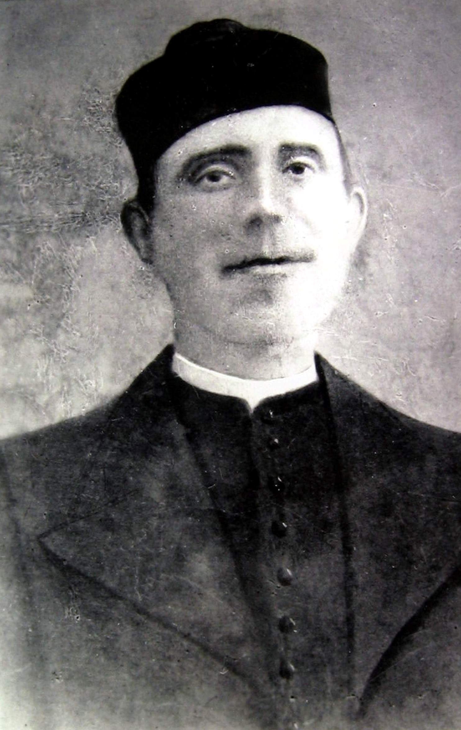 Don Blas Mañes Palomar, cura párroco y arcipreste de Ademuz (Valencia), asesinado durante la Guerra Civil Española (1936).